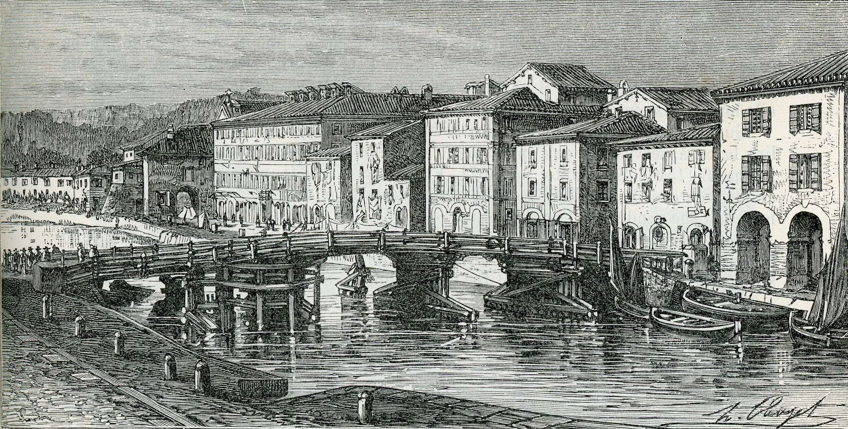 Senigallia: Il Porto ed il Ponte levatoio